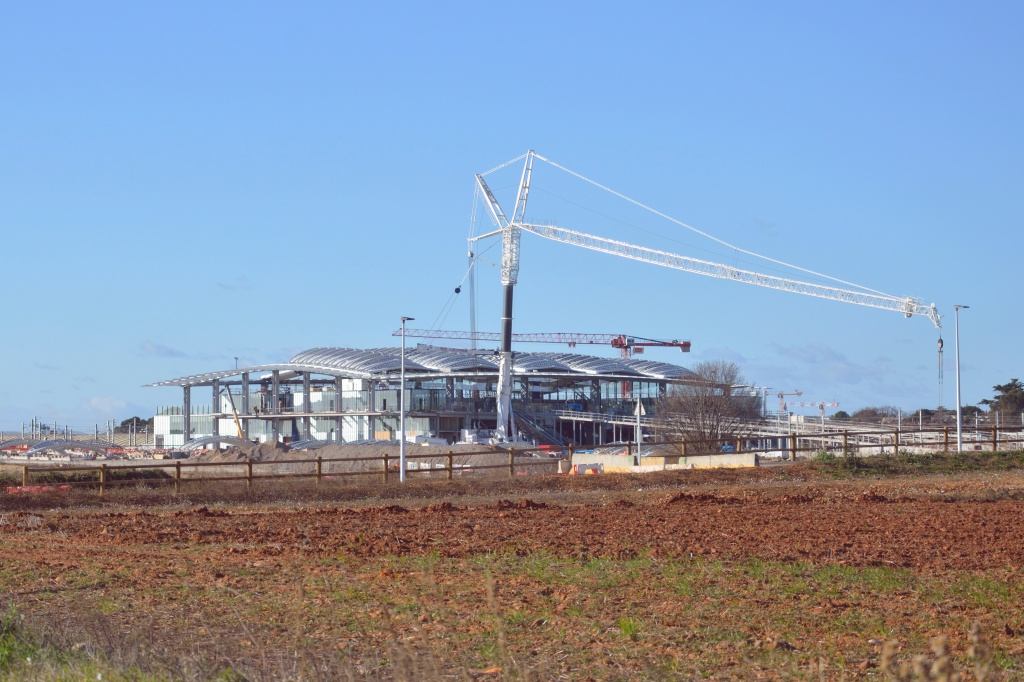 Chantier de la Gare TGV de Montpellier - Sud de France